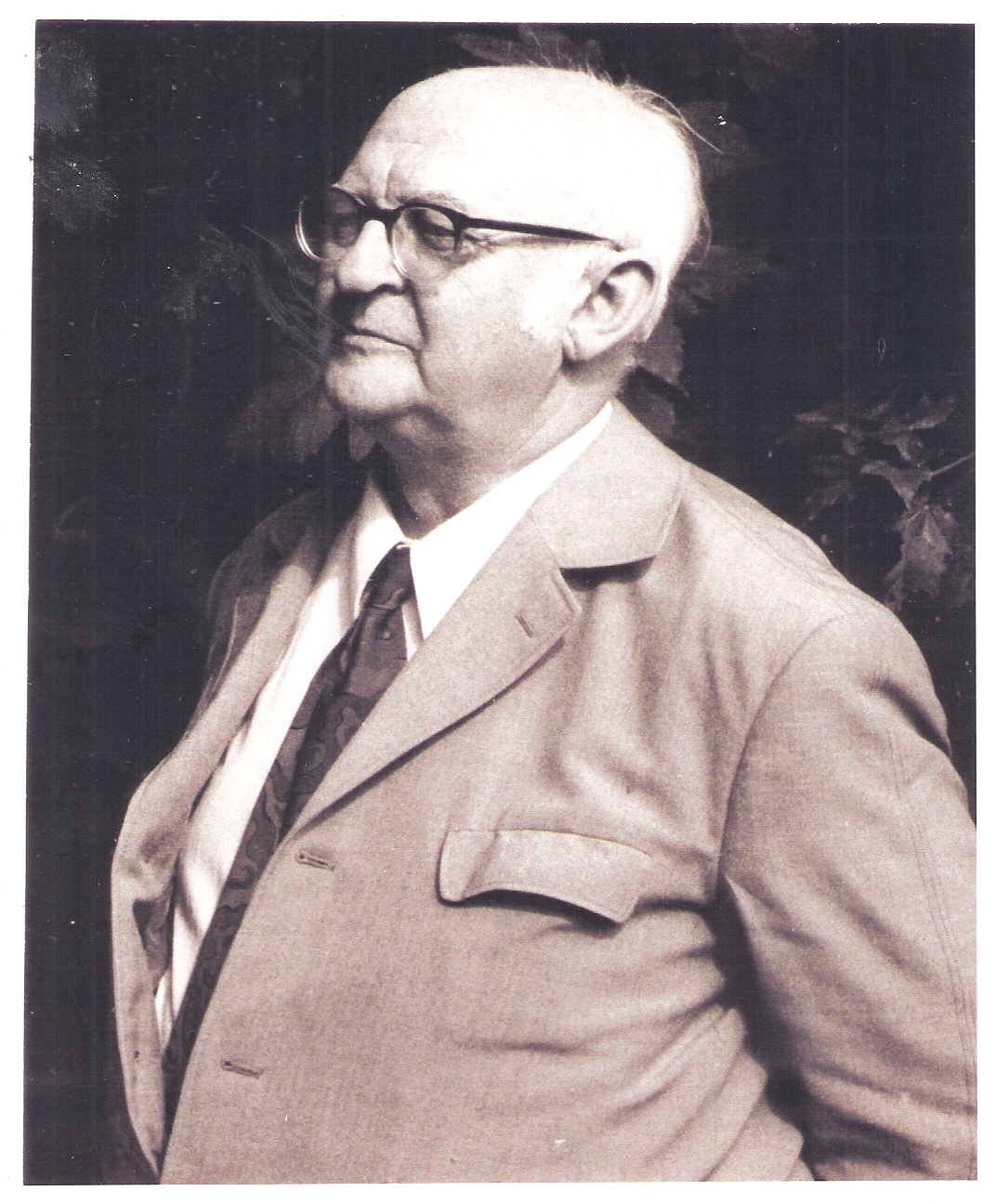 Der Fabrikant und Genealoge Fritz Roth, 1905-1987, zum 75. Geburtstag, Foto Stefan Roth